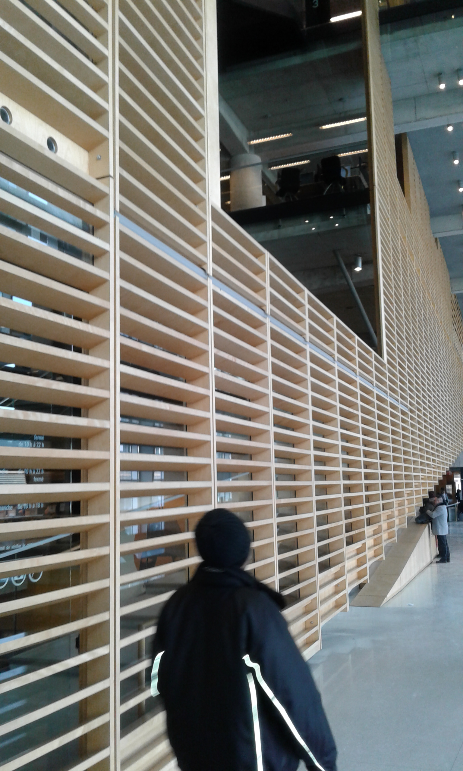 Chambre de bois de la Grande Bibliothèque du Québec à Montréal